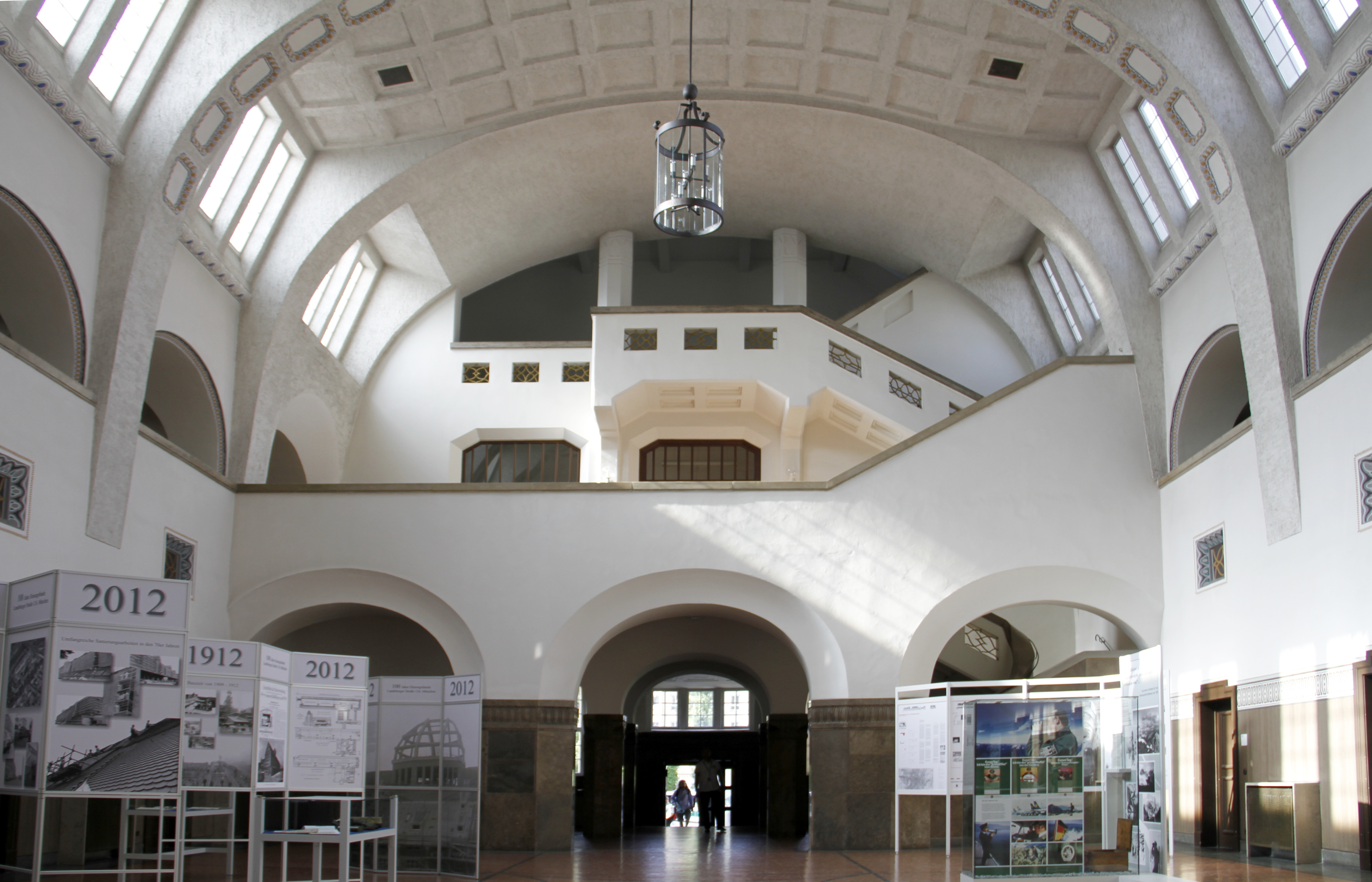 Hauptzollamt München, Eingangshalle, ehemalige Schalterhalle. Restauriert bis 1987 nach Farbresten und Fotos aus der Bauzeit 1912